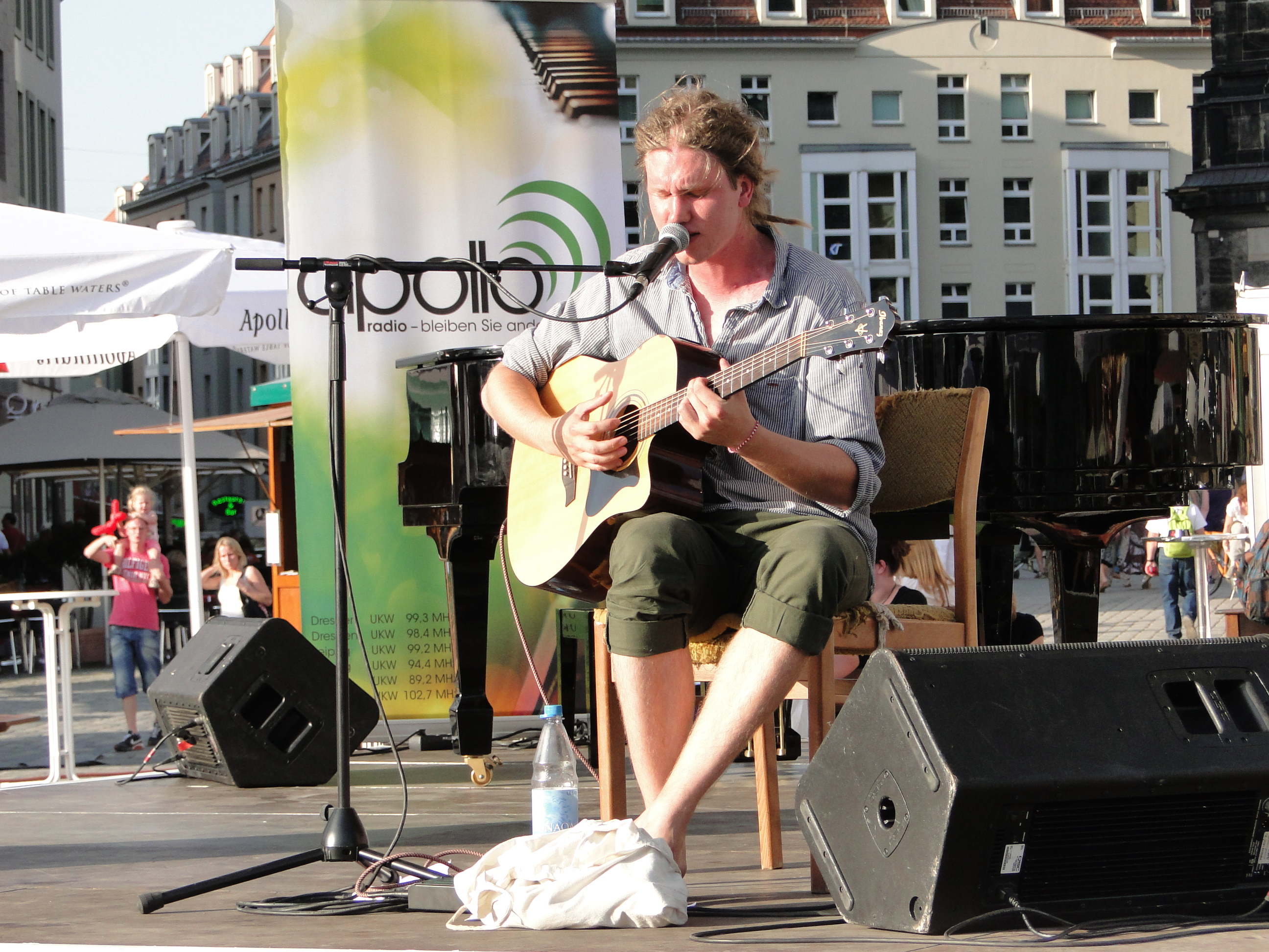 Sebastian Hackel während eines Auftritts im Rahmen des Dresdner Stadtfestes 2012